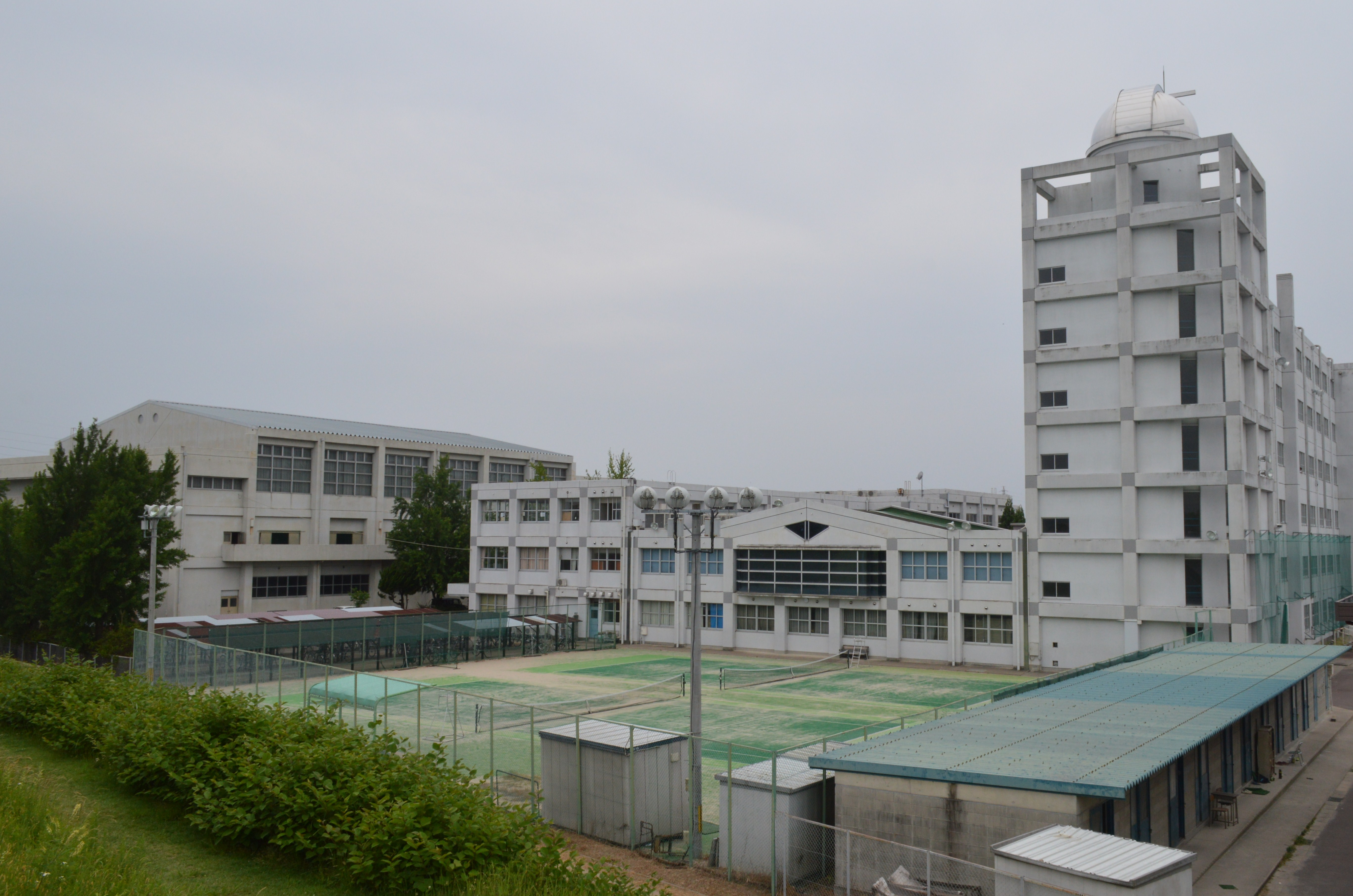 私立 岡崎城西高等学校（岡崎城西高校）